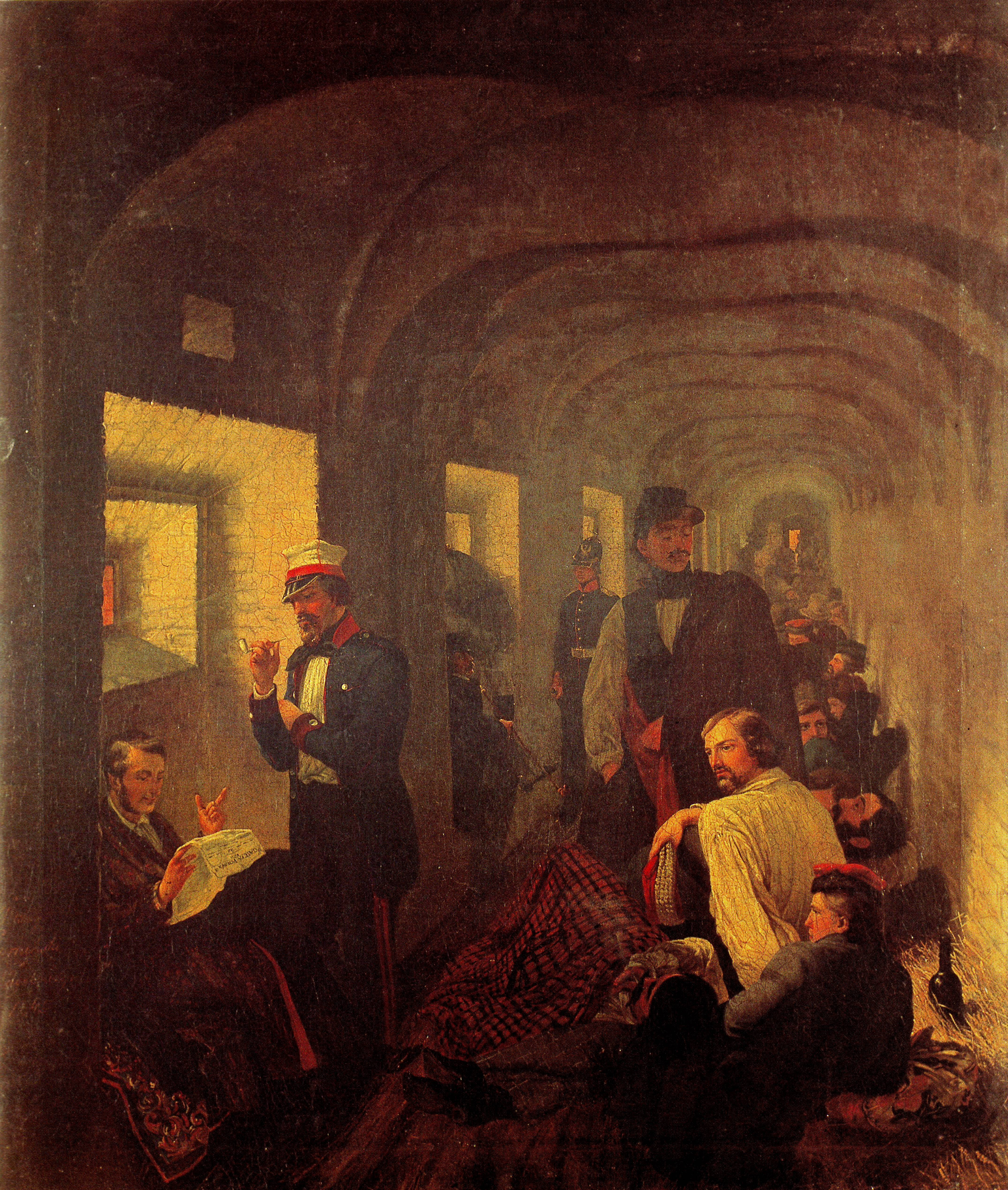 Öl auf Leinwand, Polikarp Guminski, 1849. Polnische Gefangene in Magdeburg.